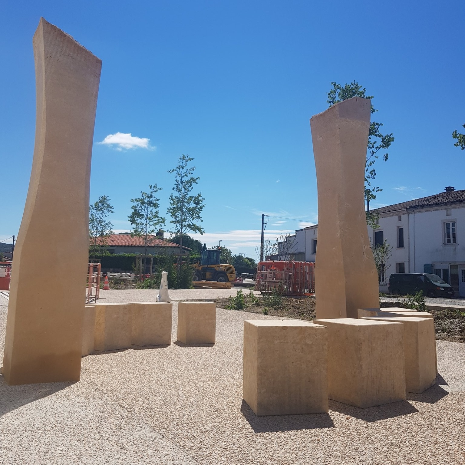 Monument, dolmen contemporain symbole de l'agriculture sur le territoire, reliant les deux premiers lieux de rassemblements humains de la commune ( le dolmen du Gouty et l'église de Valderiè)s sur l'axe Est/Ouest du lever du soleil au coucher. Déployant sur cette chronologie du temps le néolithique et le christianisme rappelant l'identité de Valderiès.